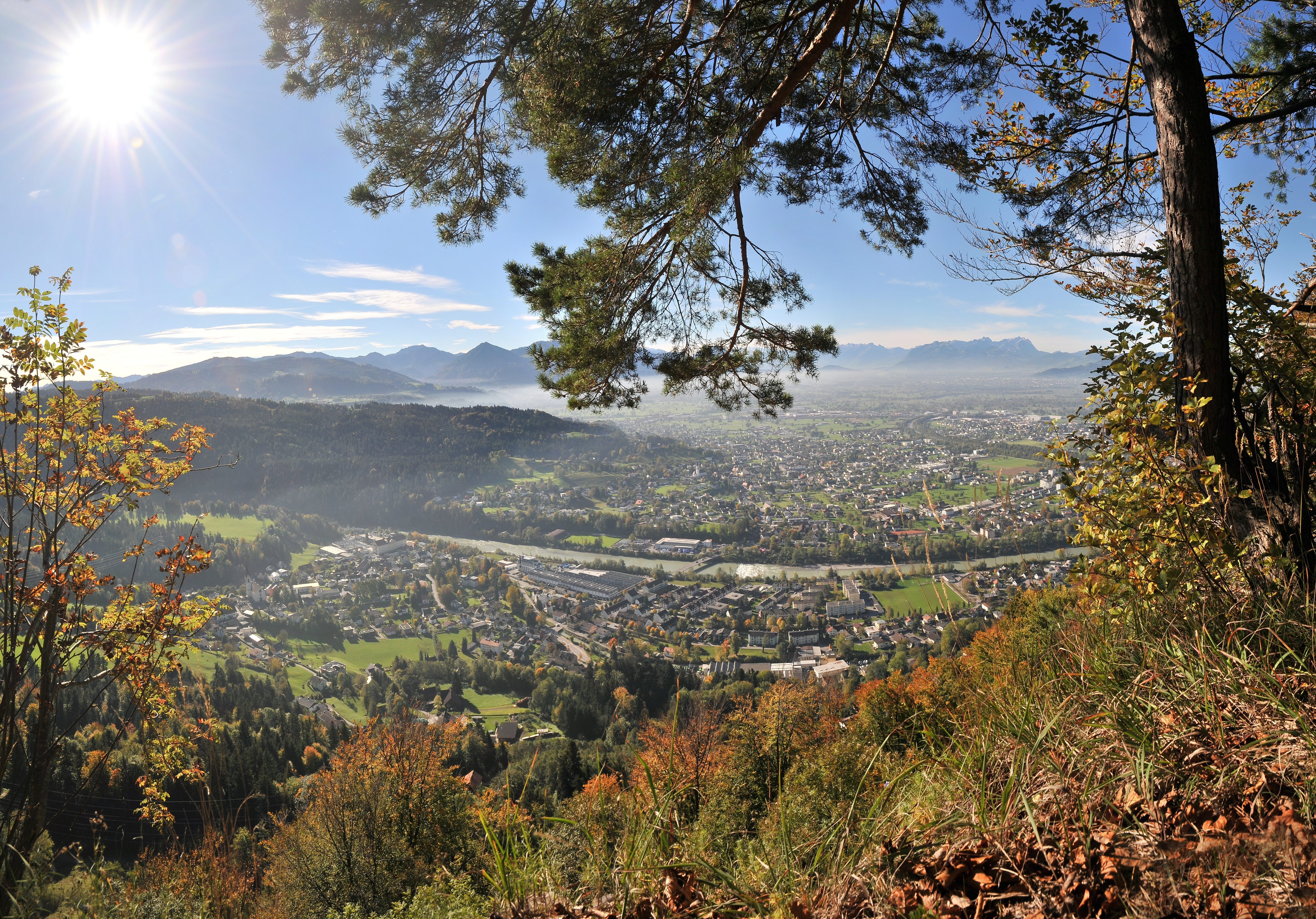 Blick vom Känzele in Bregenz auf Kennelbach. Hinter der Bregenzer Ache liegt Wolfurt.